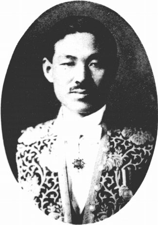 林繁蔵（1887-1945）